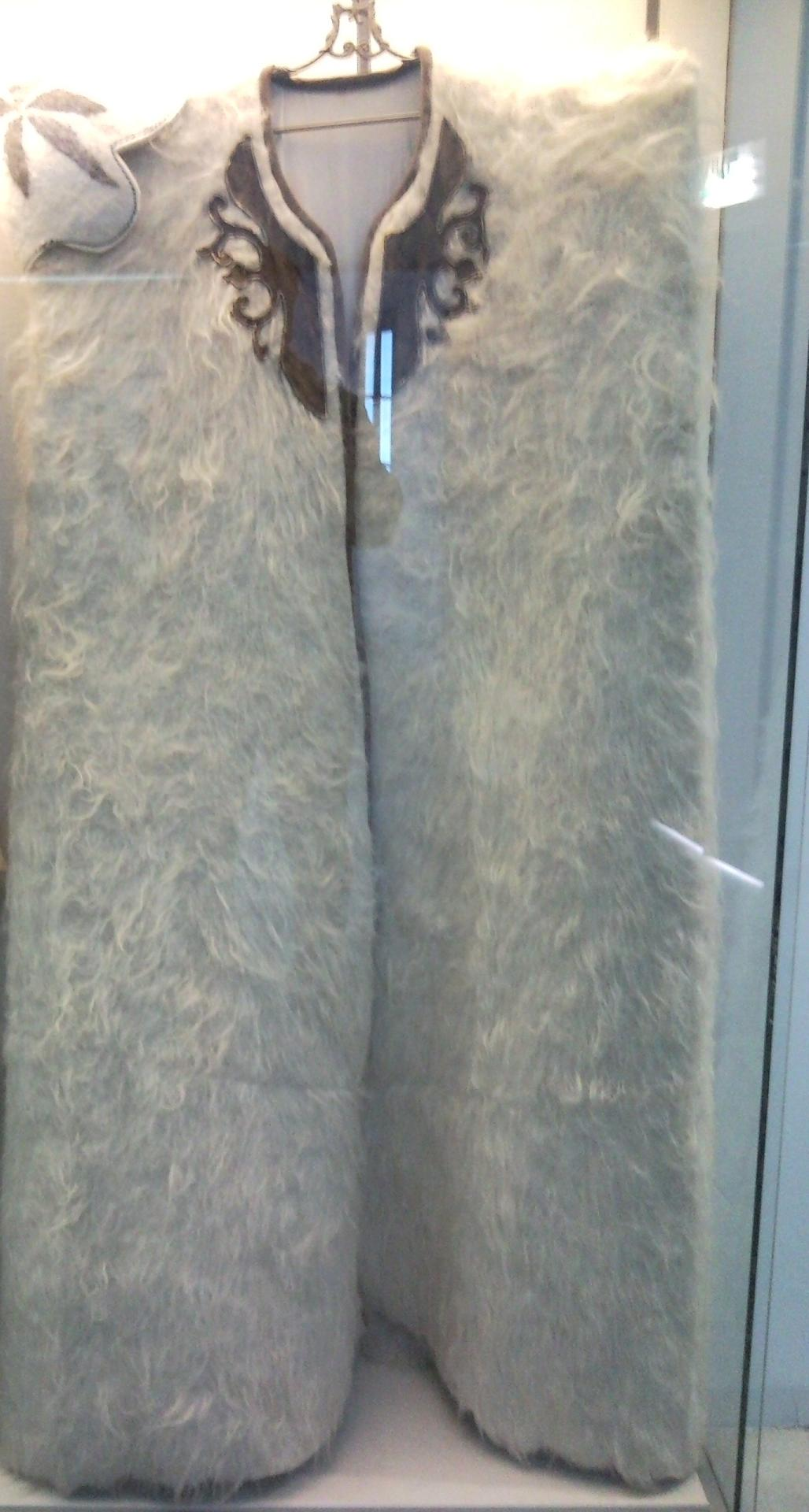 גלימה צ'רקסית